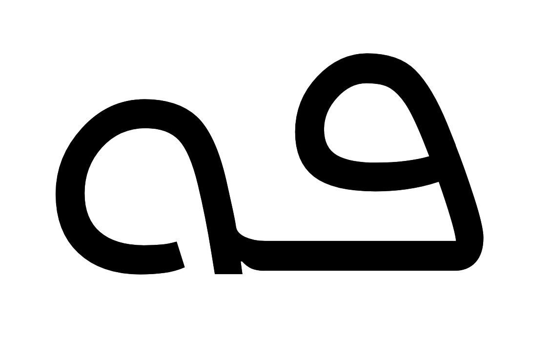 ܦܘ മലയാളം അക്ഷരം